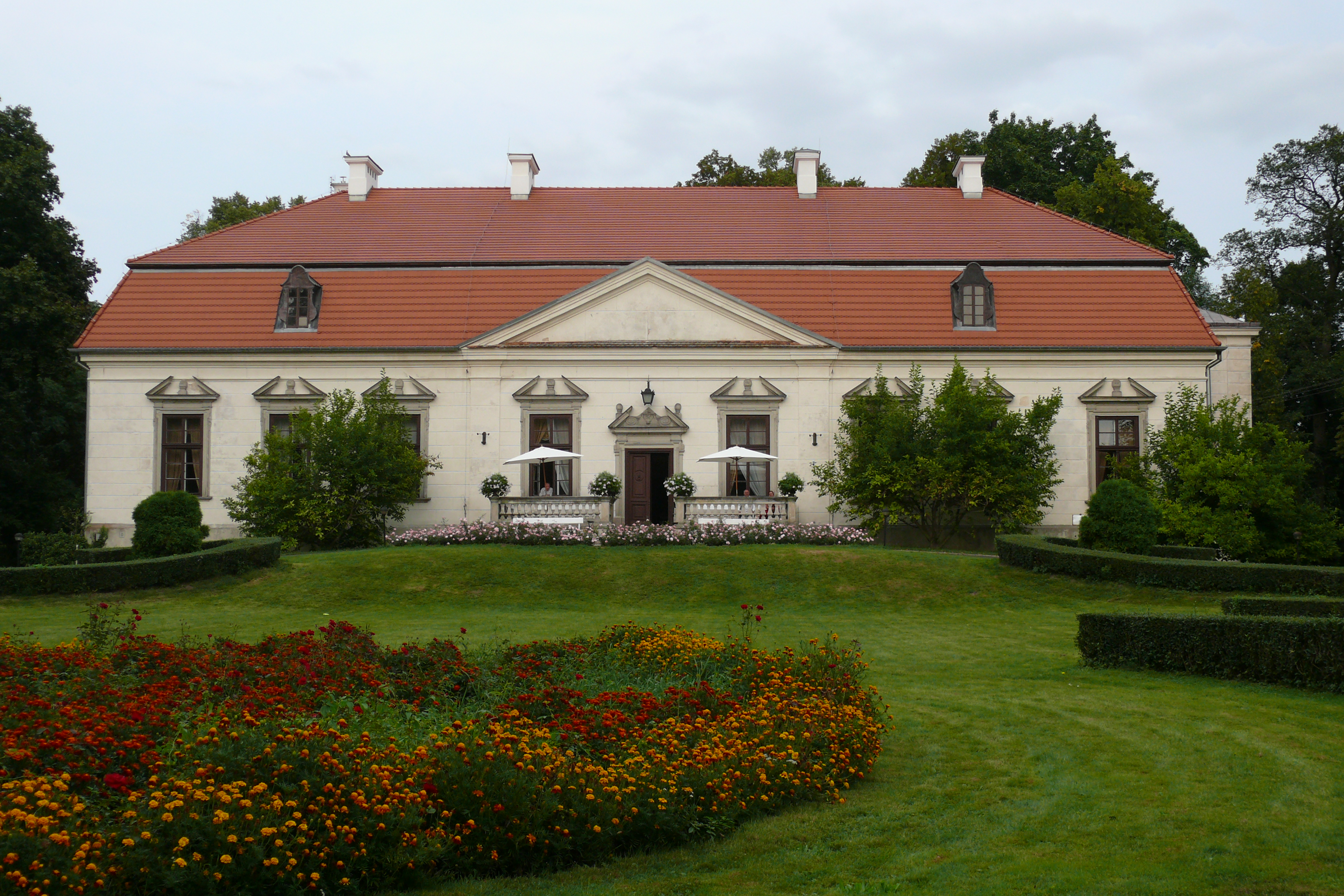 Obory - zespół dworski, obecnie Dom Pracy Twórczej ZLP im. Bolesława Prusa: dwór, 2 poł. XVII, 1751, 1893, elewacja zachodnia (zabytek nr 1069/23).